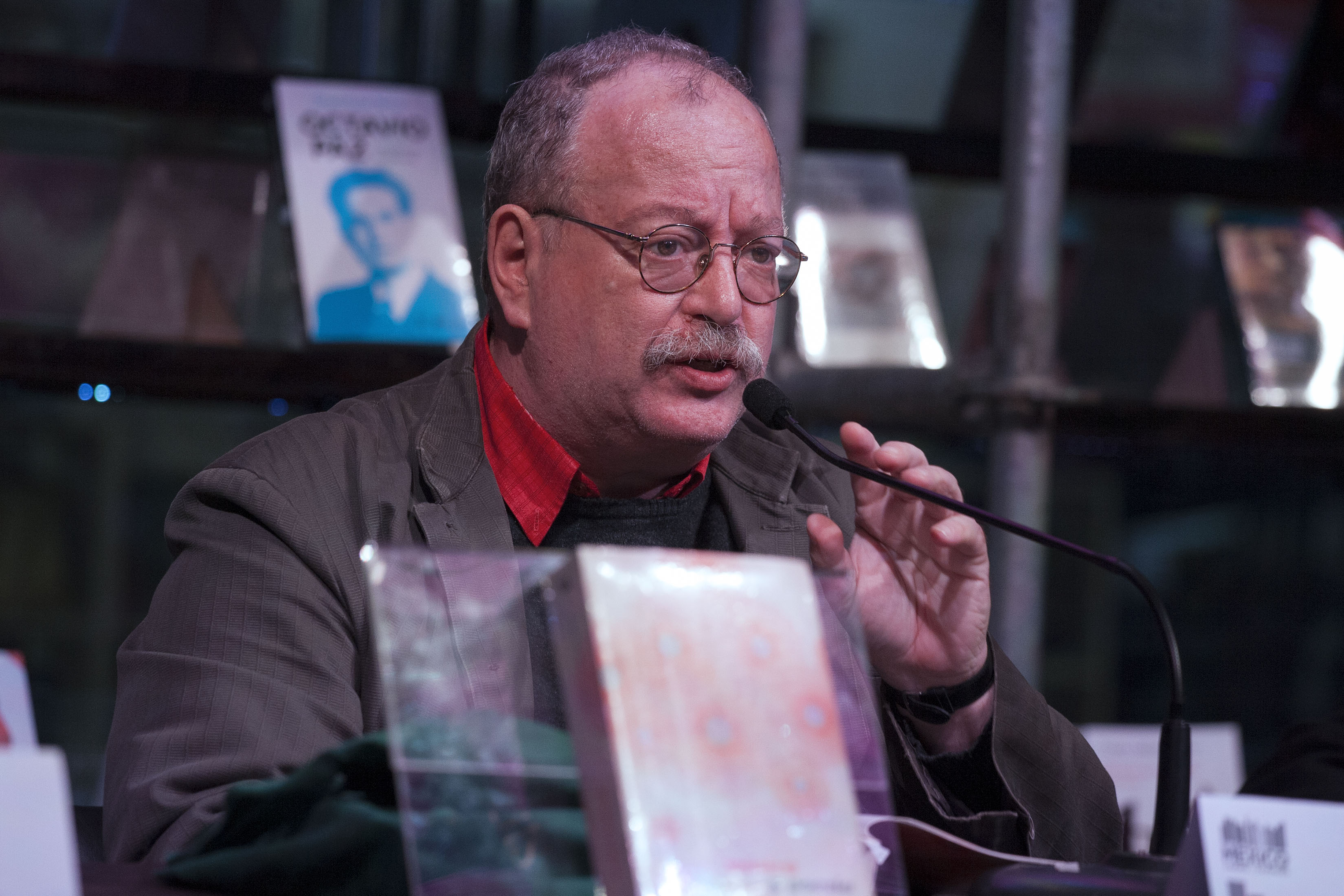 Jueves, 30 de Abril 2015. En el marco de la 41a Feria Internacional del Libro de Buenos Aires se realizó la presentación del libro Música y Poesía, editado por la Universidad Nacional Autónoma de México), con la participación del el autor, Jorge Fondebrider, Diego Fisherman y Ana Franco Ortuño, en el stand de la Ciudad de México. Foto: Antonio Nava / Secretaria de Cultura Ciudad de México.